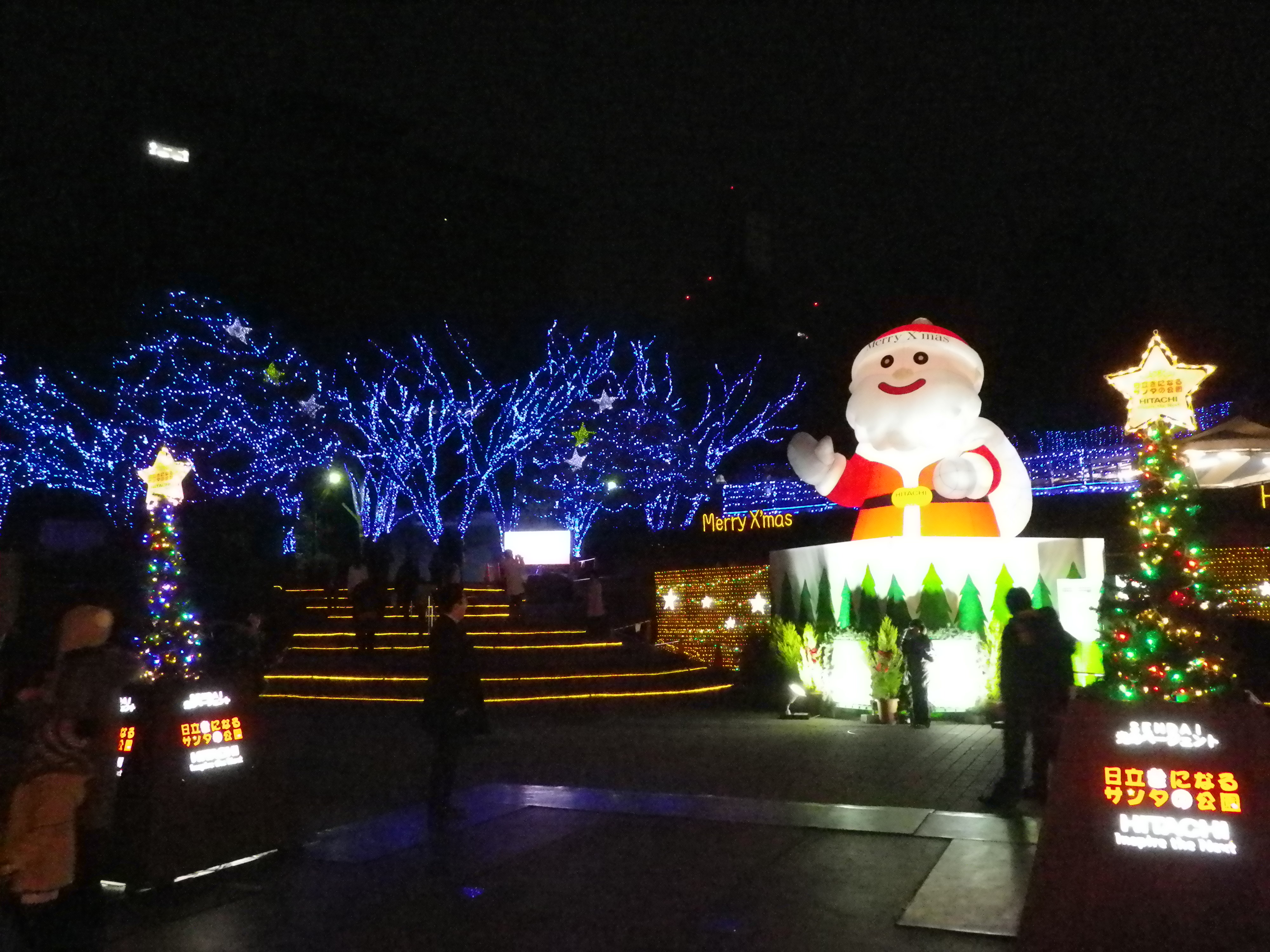 「2010 SENDAI光のページェント」における勾当台公園の「日立きになるサンタの公園」（日立製作所東北支社および東北・日立グループの協賛企画）。2002年より2012年までの11年間、毎回設置（2013年以降は設置せず）。